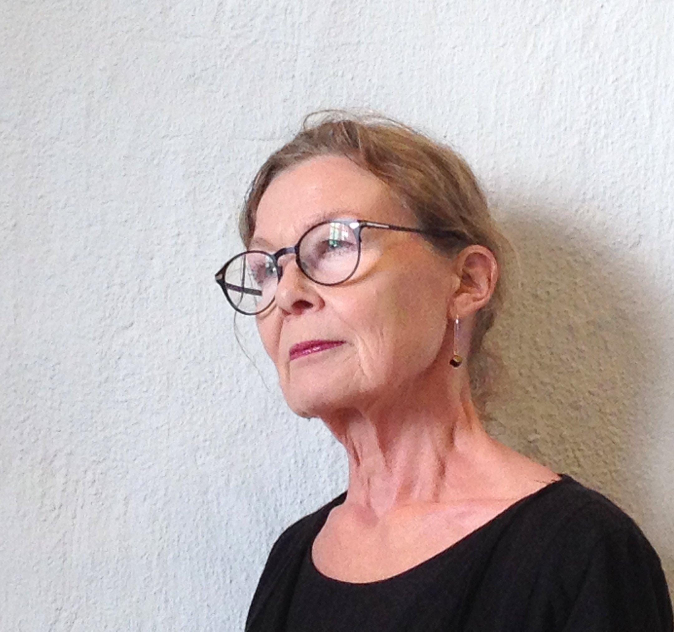 Birgitta Lorentzon, svensk bildkonstnär inom bland annat måleri och grafik.